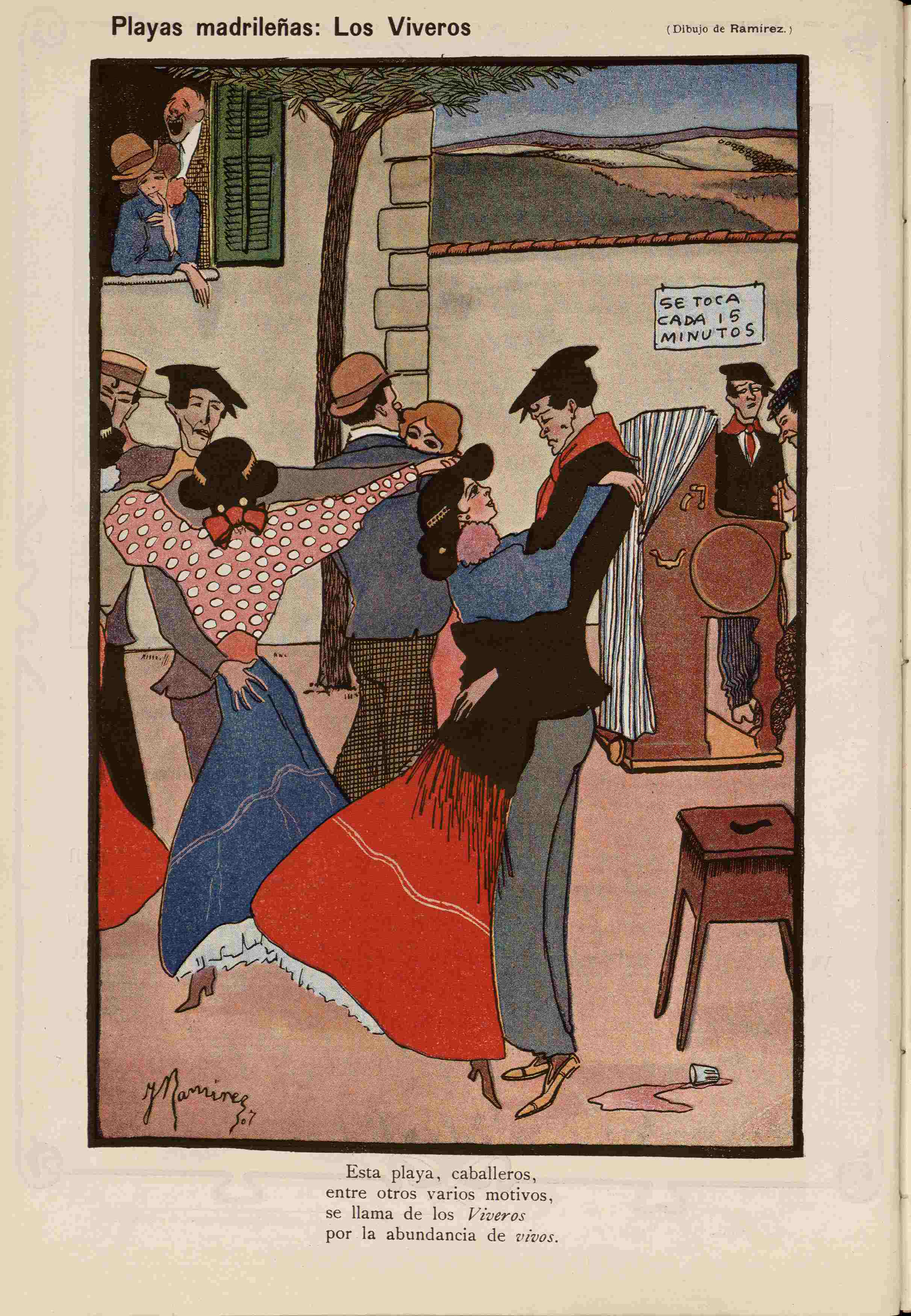 Playas madrileñas: Los Viveros.